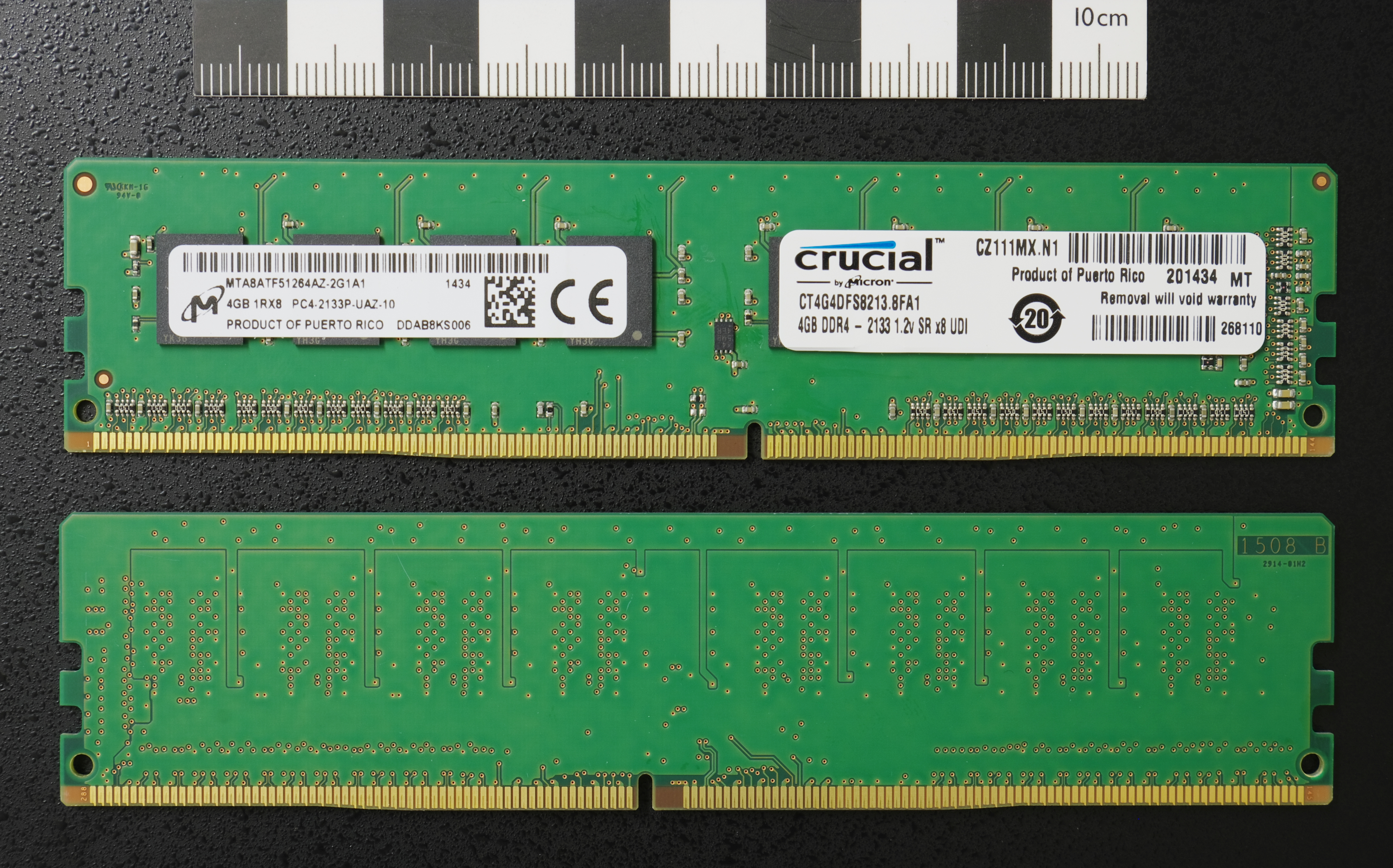 Crucial DDR4 DIMM 4GB